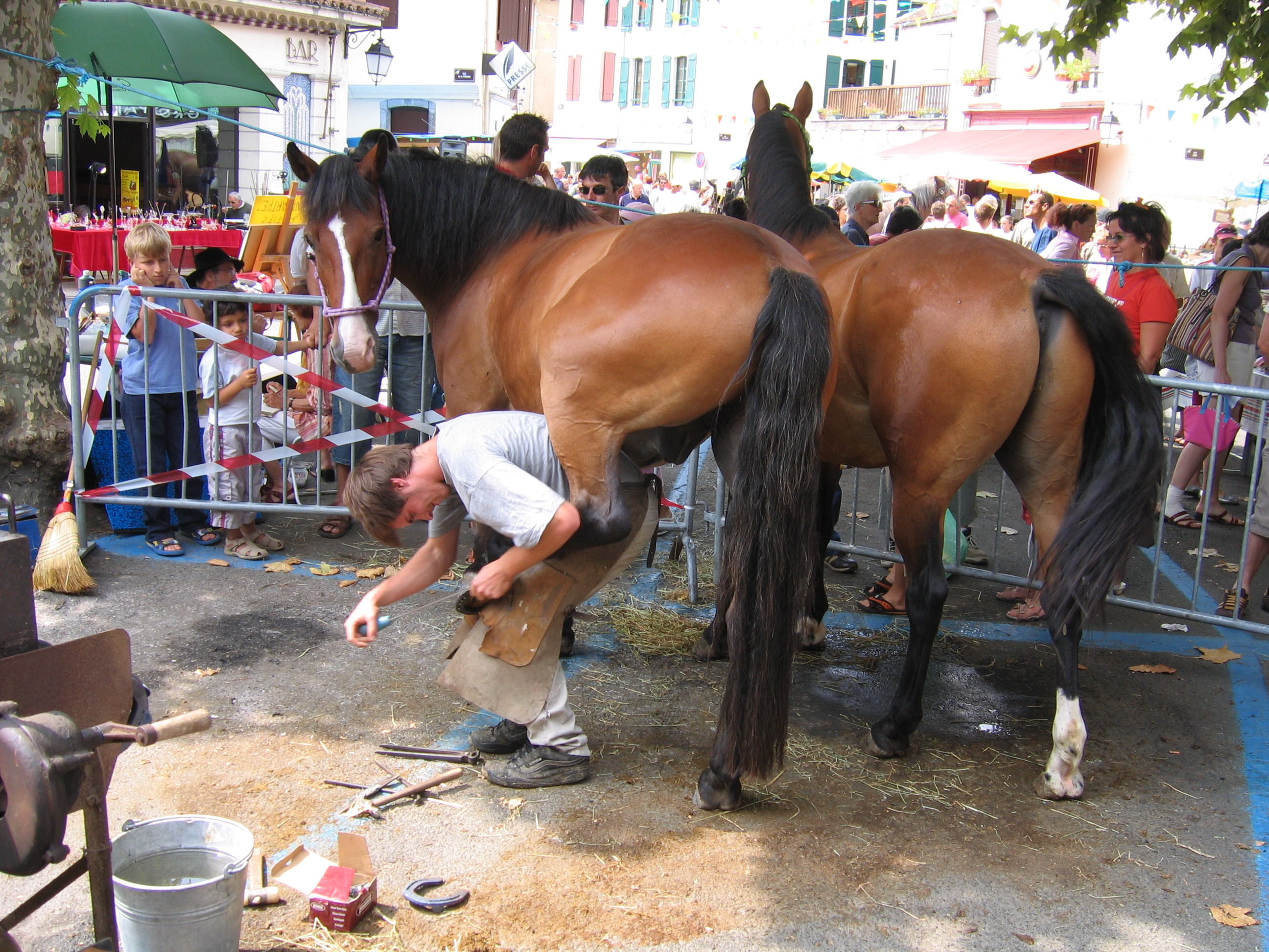 Netjes bijvijlen van de spijkers....